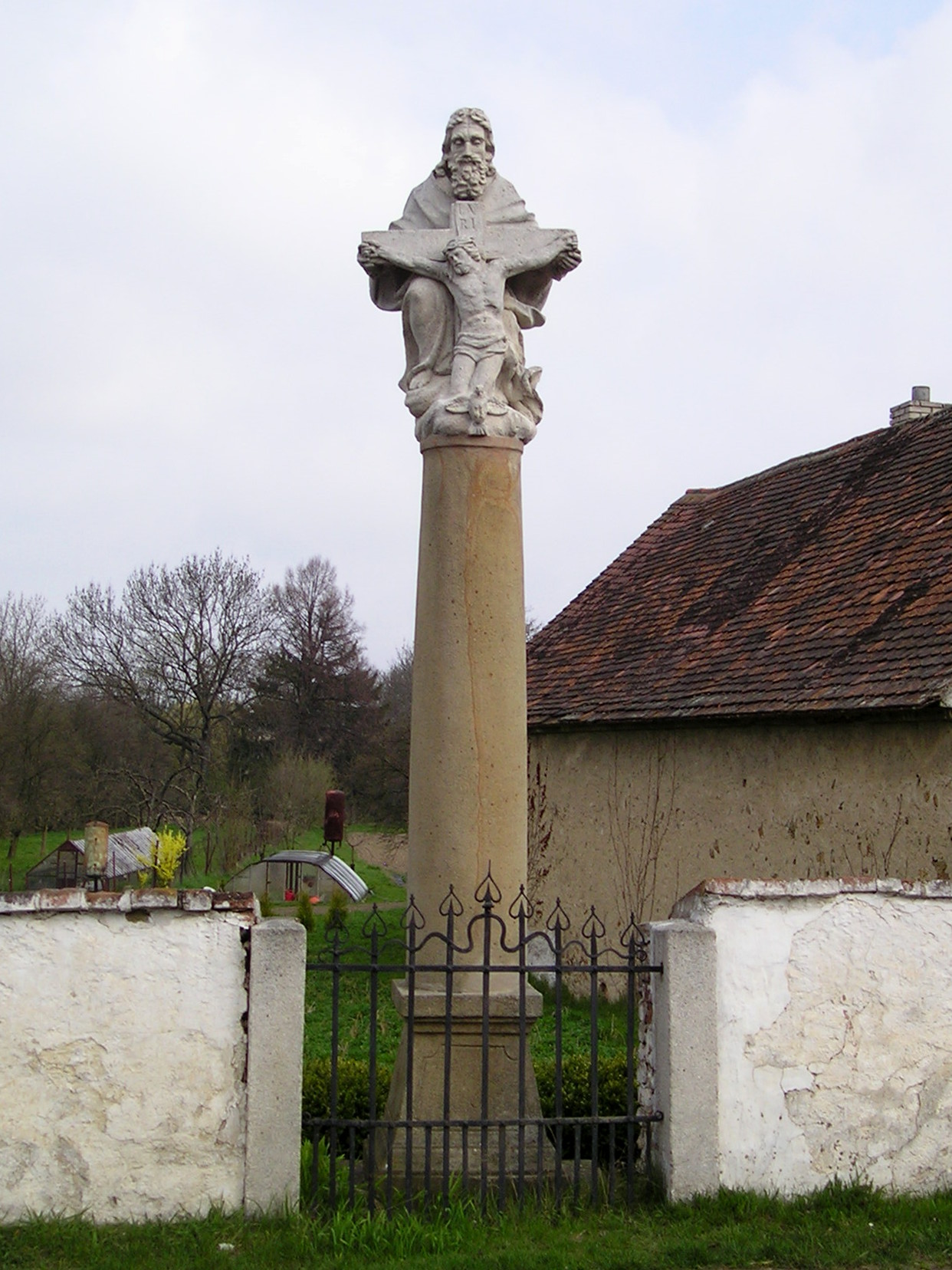 Sousoší Nejsvětější Trojice (Pavlice), ves, Pavlice